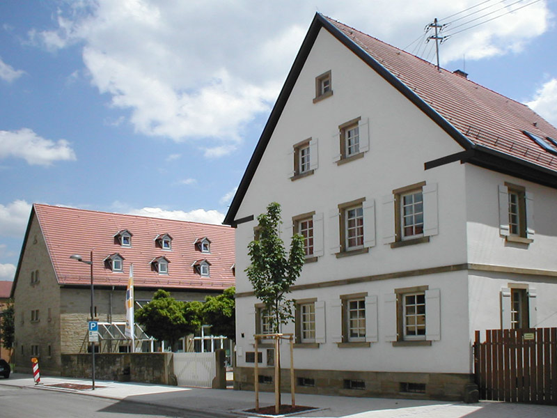 Kulturhaus Bad Rappenau, ehemaliger Fränkischer Hof, erbaut 1842